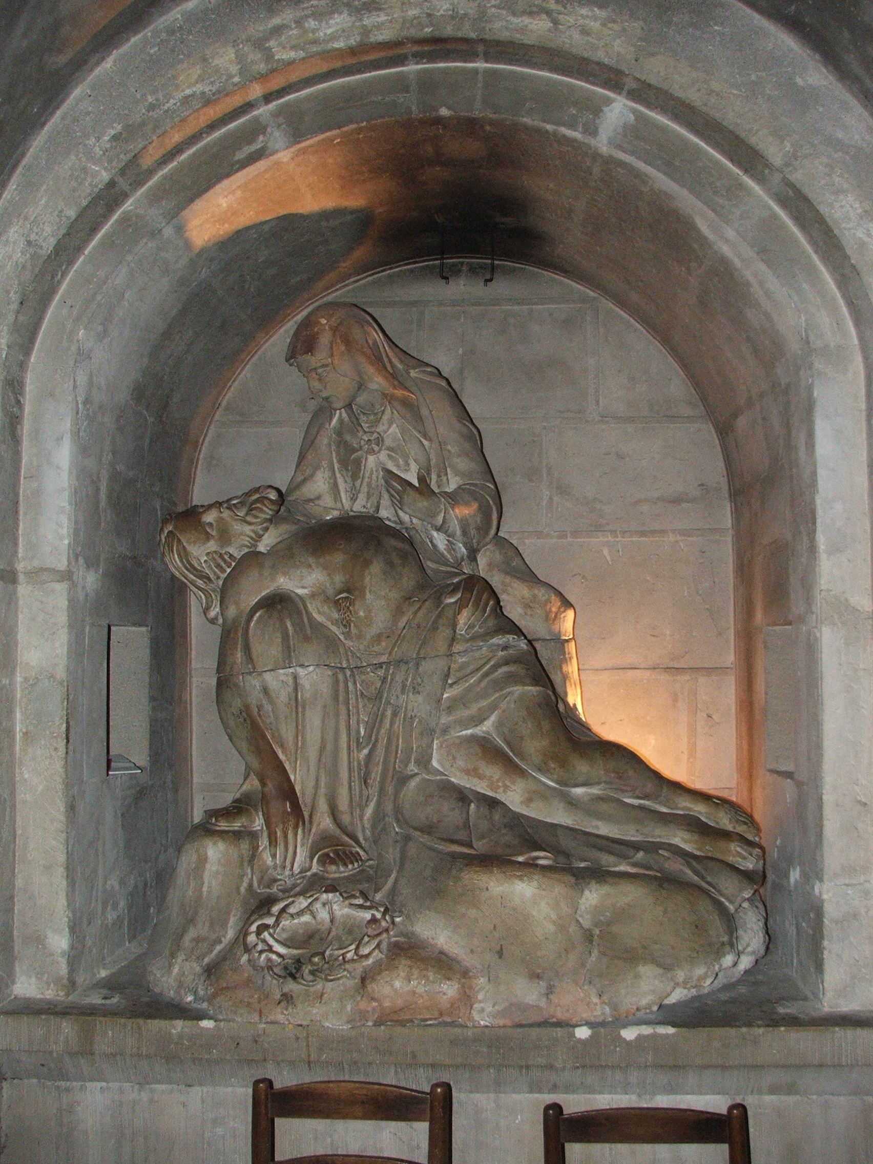 La crypte de Saint-Bertrand à l'église gothique Notrea-Dame de la Couture du Mans.